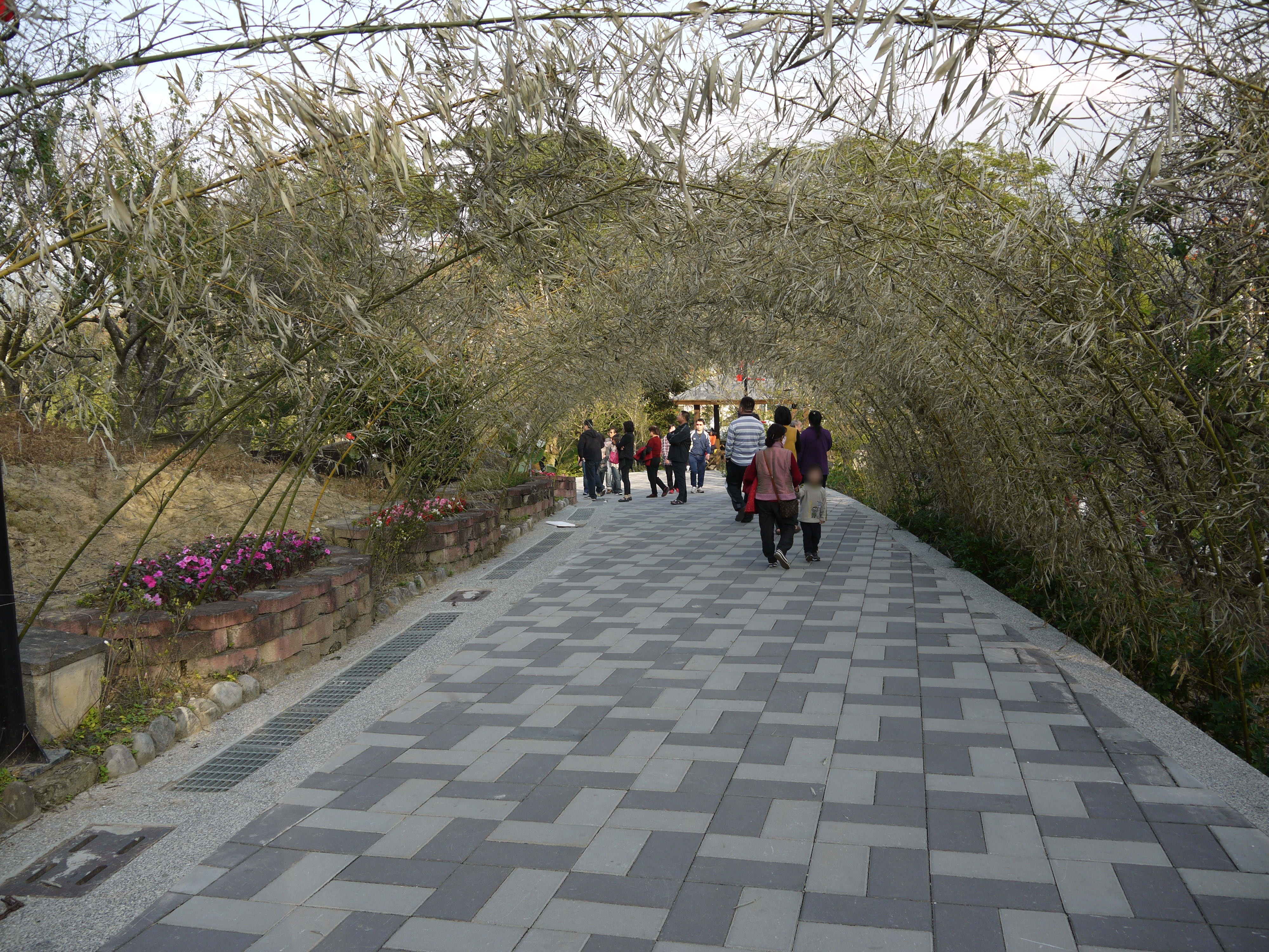 嘉義縣梅山鄉 梅山公園